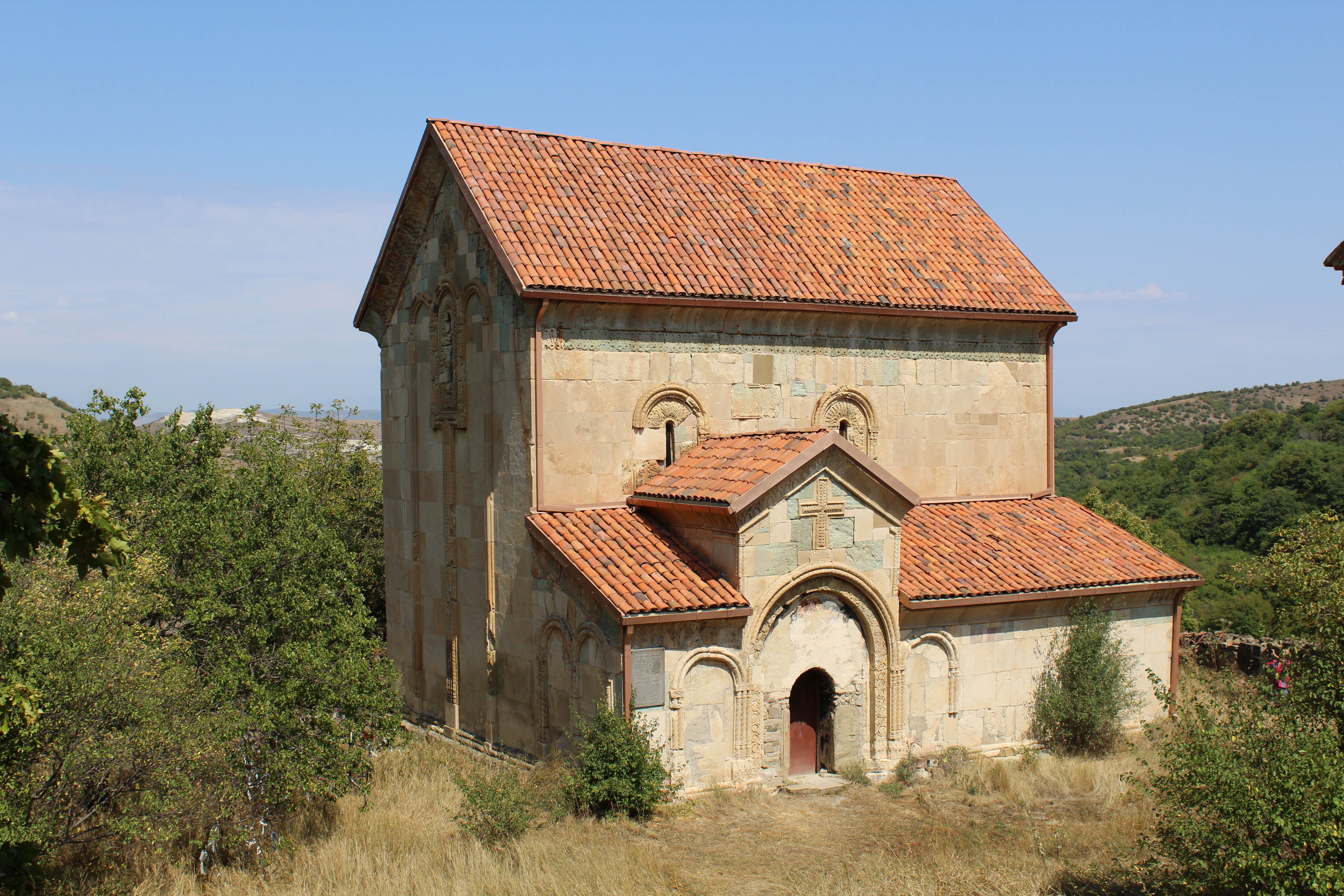 მაღალაანთ ეკლესია და მისი ანსამბლი XII საუკუნეს მიეკუთვნება და კასპის მუნიციპალიტეტის სოფელ წინარეხიდან 2,5 კმ-ითაა დაშორებული, მდებარეობს მდინარე კავთურის მარცხენა ნაპირზე